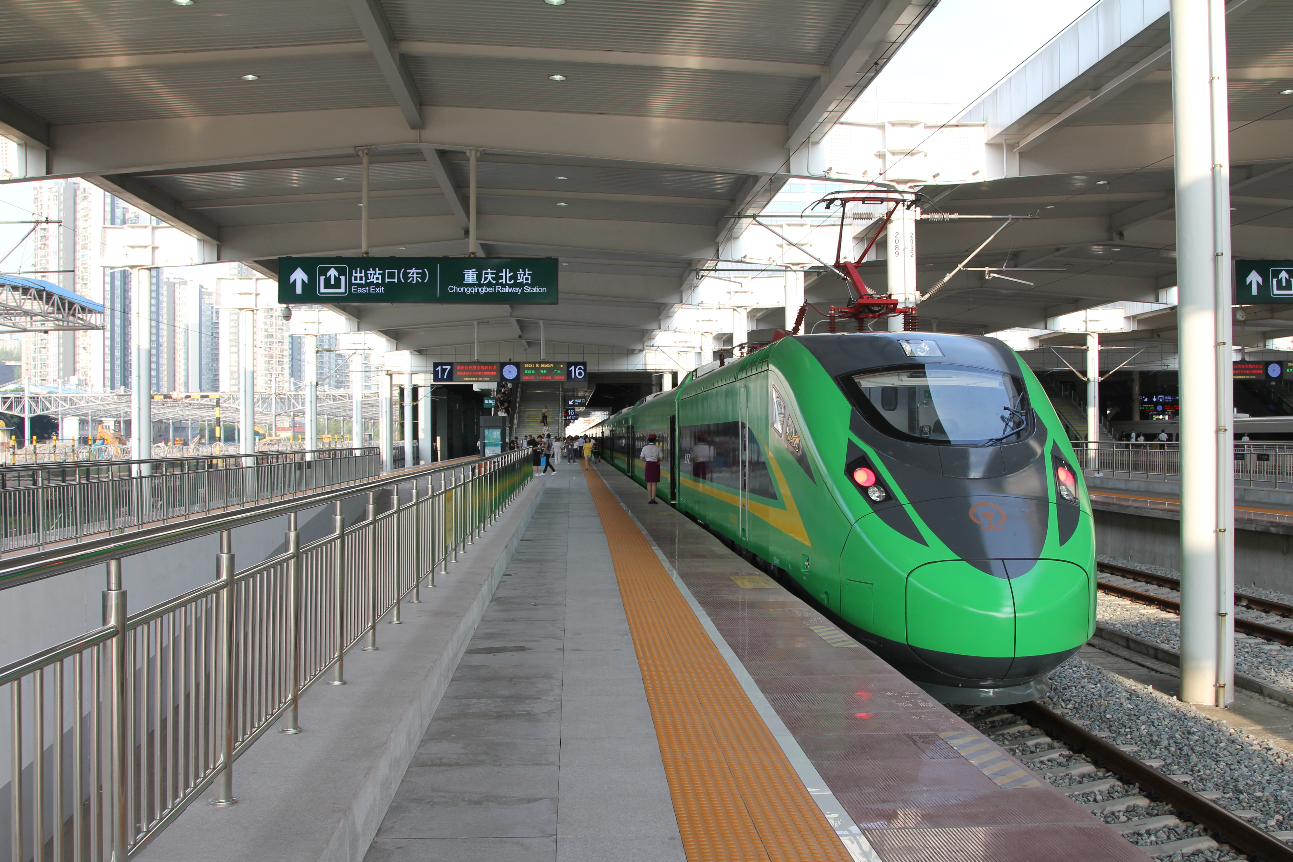 中文（中国大陆）: CR200J-1009（动力车编号忘了看）在重庆北站北广场 16 站台。成都铁路局由 9 月 12 日起开通重庆到广元列车，由 CR200J 重连担当